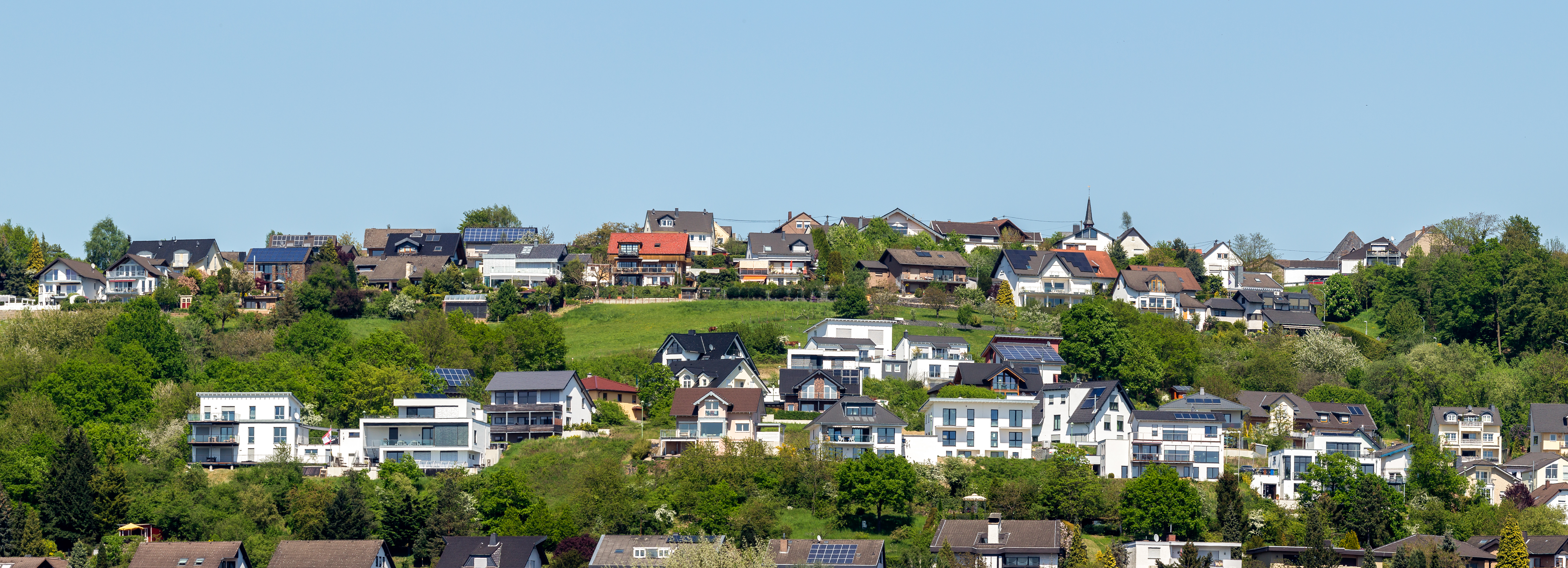 Panorama von Orsberg, Erpel. Die oberste Häuserreihe gehört zu dem Erpeler Ortsteil Orsberg. Die mittlere und untere Häuserreihe direkt zu Erpel